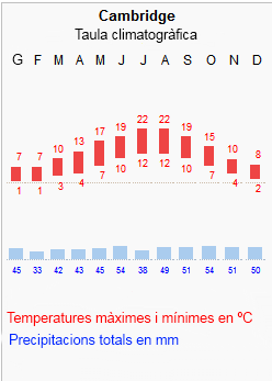 Esquema de un climograma.